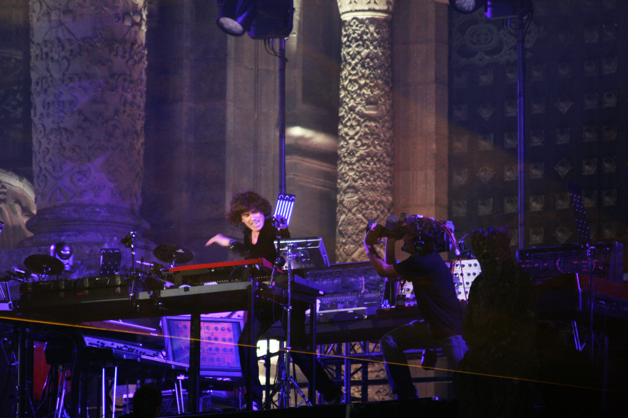 Concierto de Jean Michel Jarre en Santiago de Compostela (Galicia, España) el 31 de julio de 2010. Concert of Jean Michel Jarre Concert of Jean Michel Jarre in Santiago de Compostela (Galicia, Spain) on July 31th of 2010.